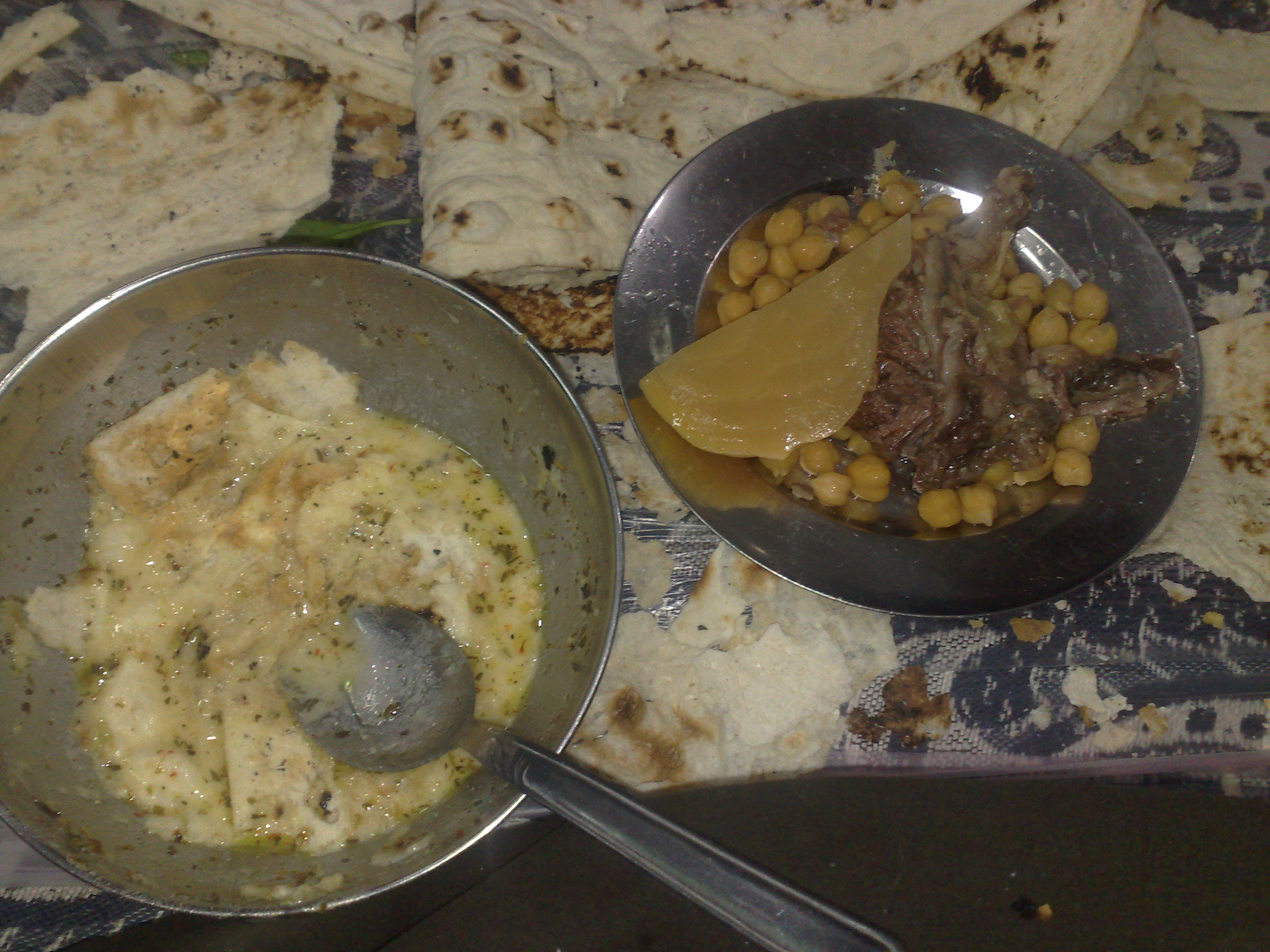 آبگوشت دودار غذای محلی اراک و به ویژه کرهرود و سنجان